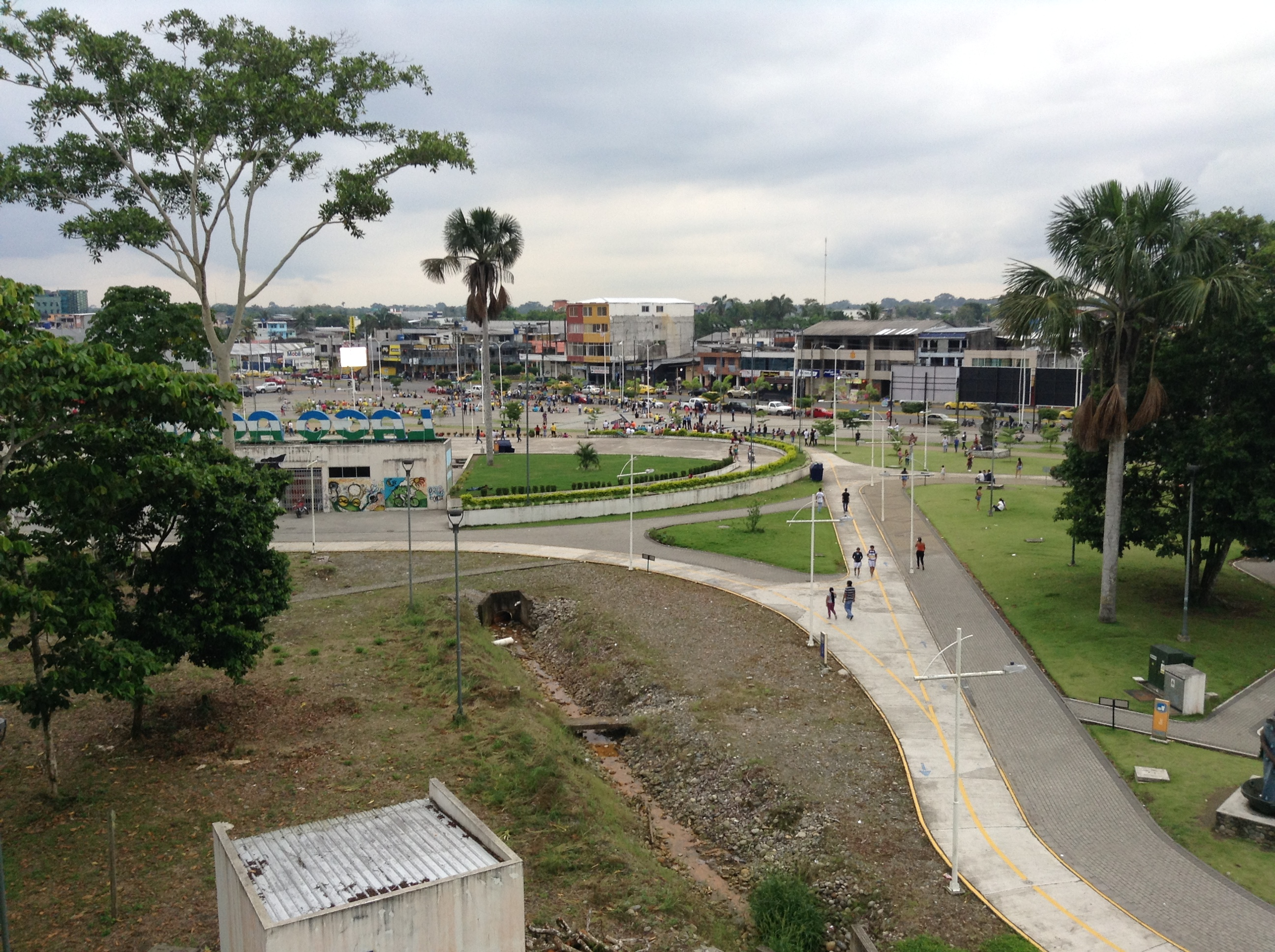 PARQUE LOJA